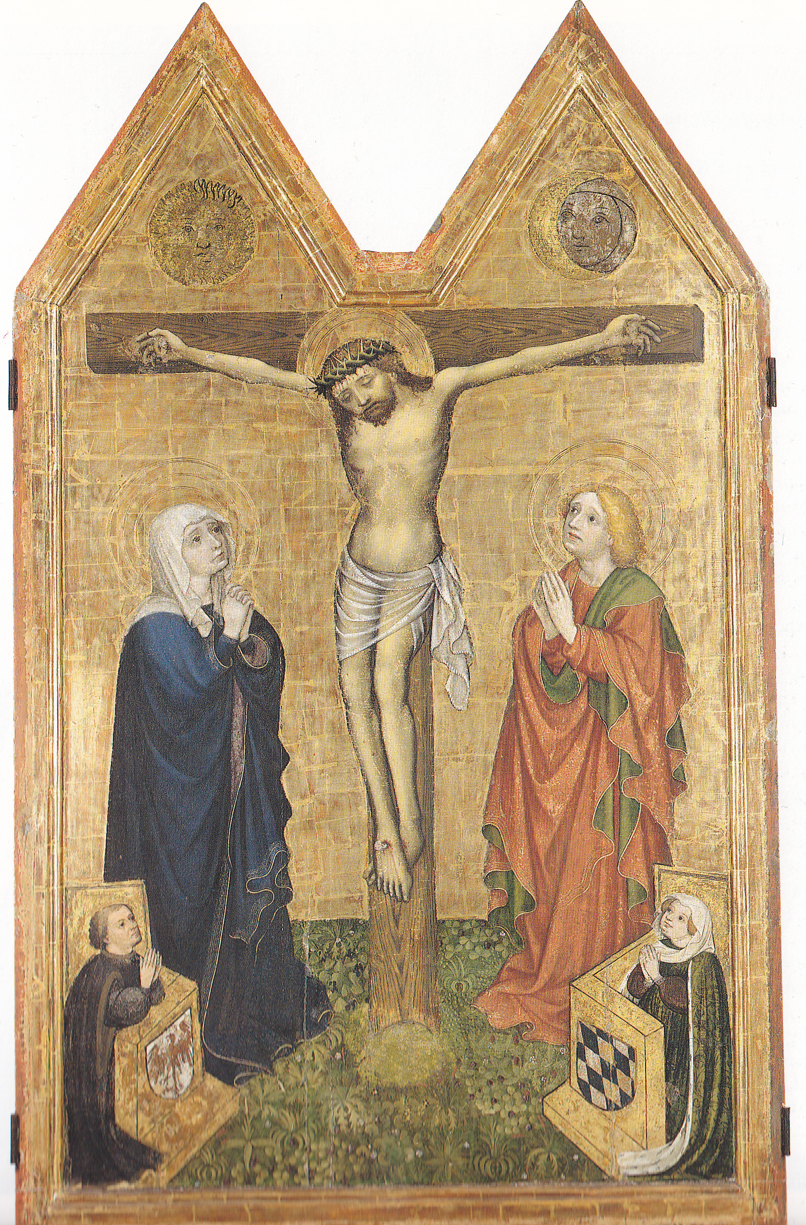 Das Dreiflügel-Retabel zeigt auf der Mitteltafel die Crucifixion with Saint Mary and Saint John Evangelist sowie die in Betstühlen knienden Stifter, auf den Flügeln innen die Heiligen Cäcilie und Valerian, auf den Außenseiten der Flügel die Verkündigung. Als zugehörig gelten zwei heute verschollene Standflügel mit den Heiligen Urban und Sigismund. Anhand der Entstehungszeit des Altars und der an den Betstühlen angebrachten Wappen von Zollern und Bayern sind die Stifter als Burggraf Friedrich VI. – als Kurfürst von Brandenburg Friedrich I. – und seine Gemahlin Elisabeth aus dem Haus Bayern-Landshut zu erkennen, zu deren Hauptresidenzen die Cadolzburg zählte. 1426 zog sich Friedrich I. hierhin zurück. 1850 machte der preußische Jurist und Geschichtsforscher Julius v. Minutoli das im Zuge seiner Forschungen über Friedrich I. wiederentdeckte Werk publik. Nach dessen Besichtigung 1873 und auf seinen dringenden Wunsch erhielt Kronprinz Friedrich (III.), diesen als Geschenk.